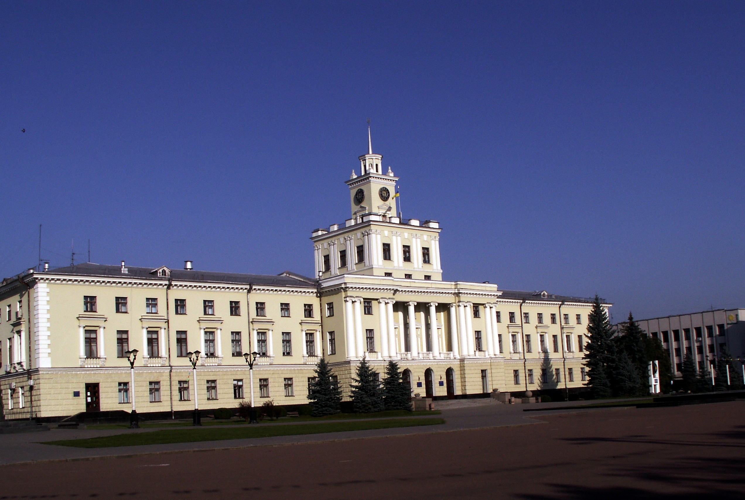 Khmelnitsky Srities administracijos pastatas